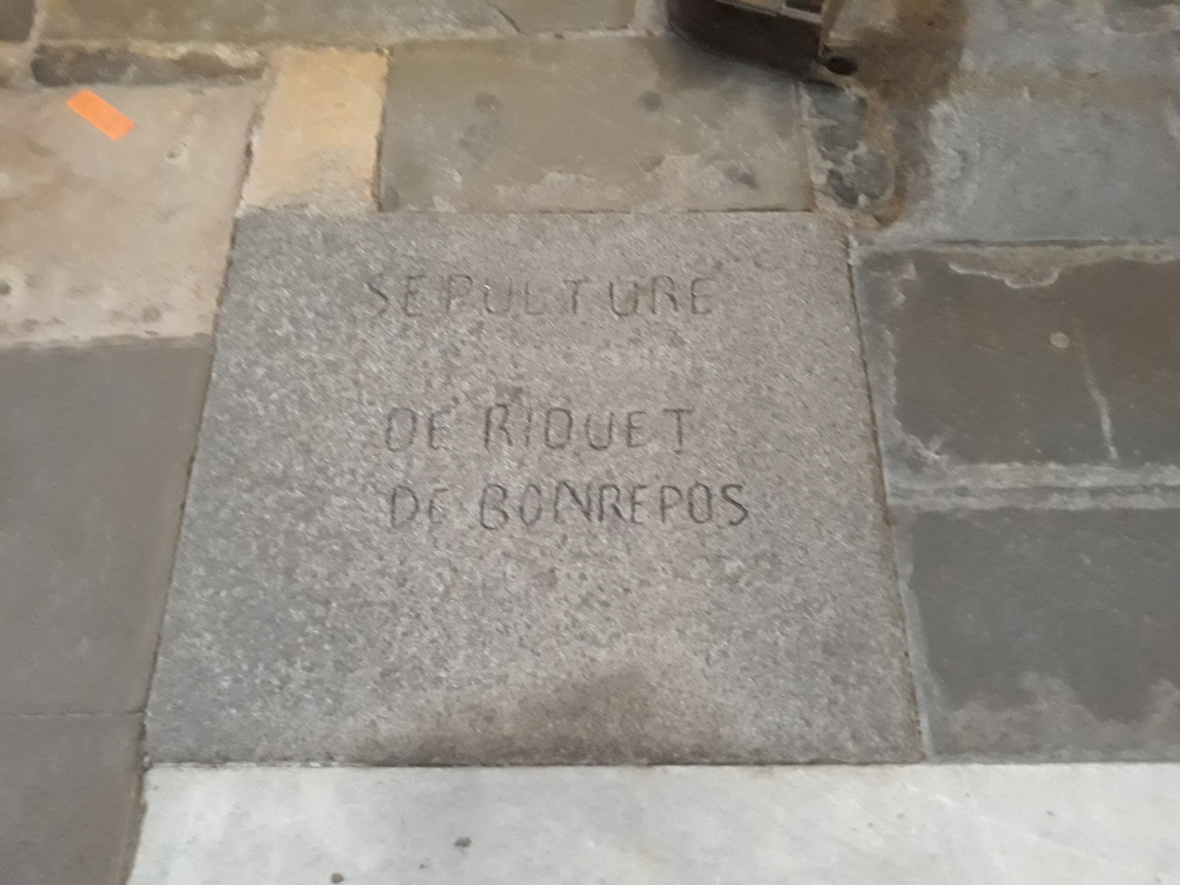 Das Grab des französischen Ingenieurs Pierre-Paul Riquet der Bonrepos in der Kathedrale von Toulouse.